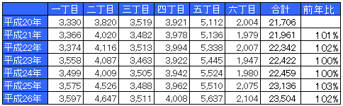 久が原の人口推移。ソースは大田区の統計情報